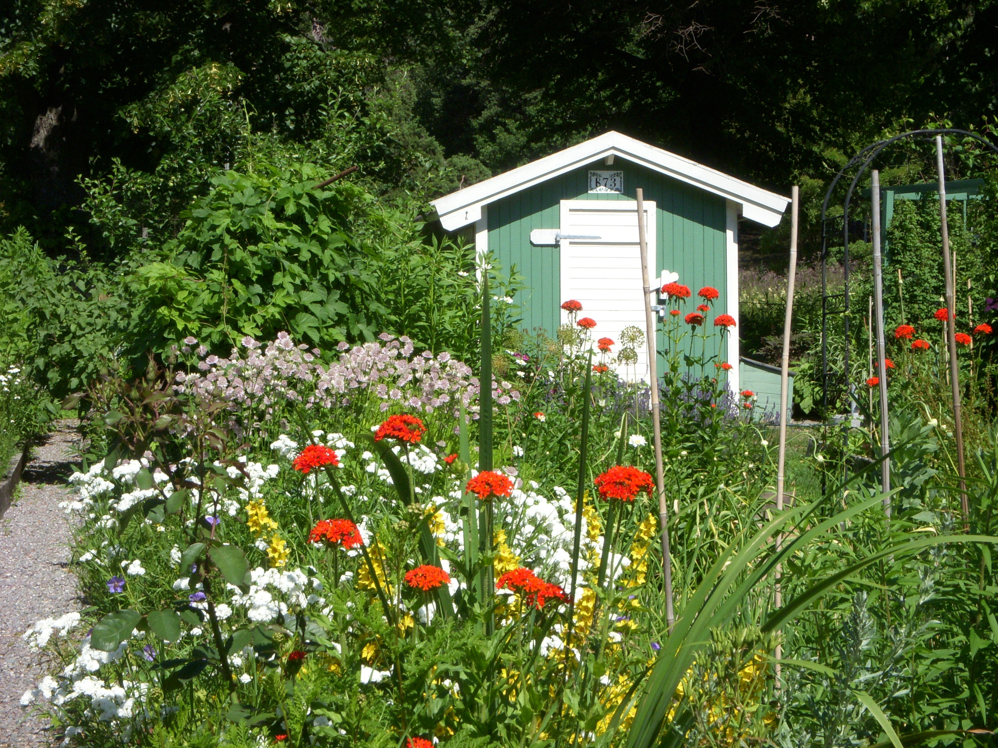 Koloniföreningen Söderbrunn på Norra Djurgården, Stockholm